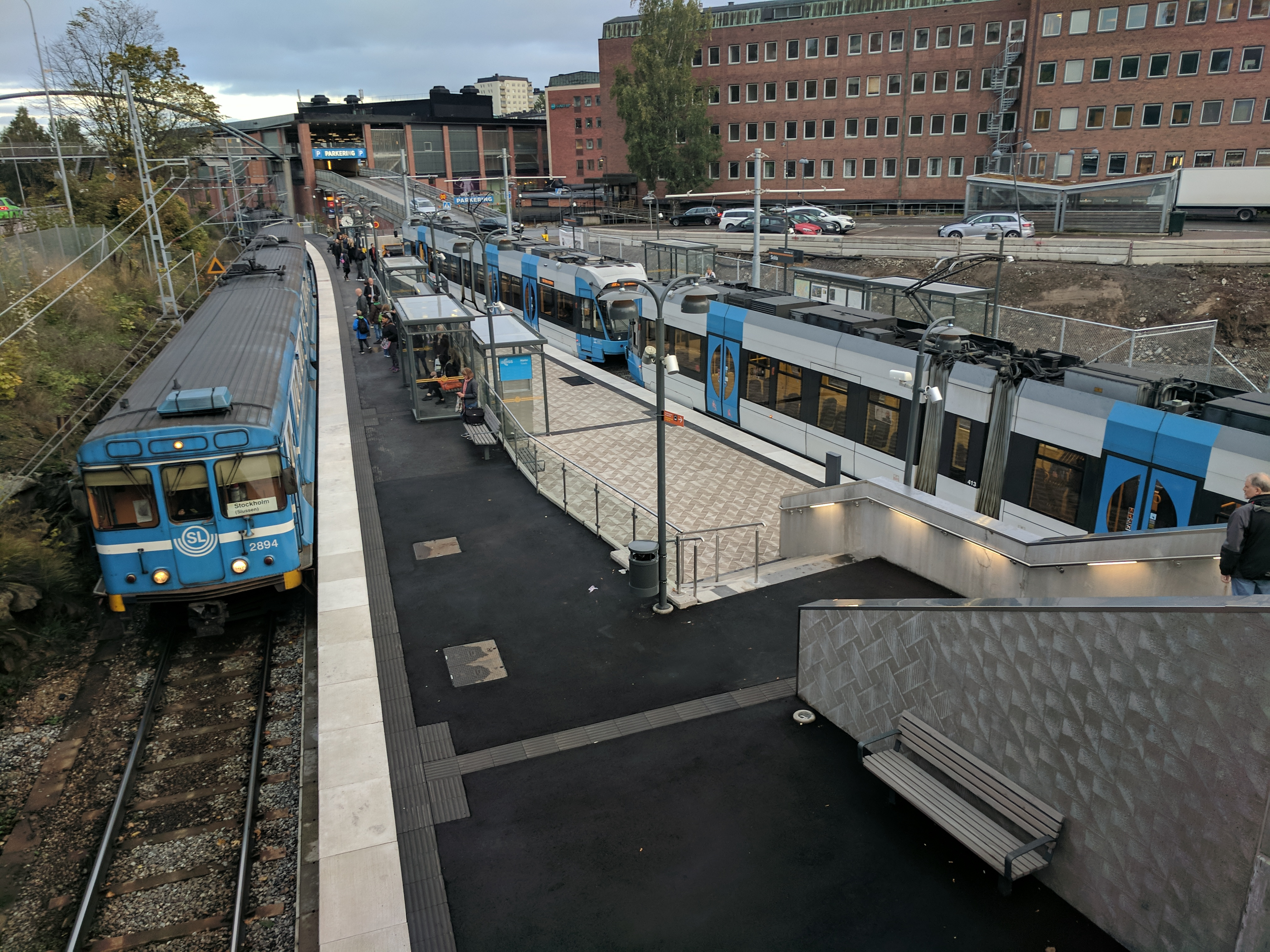 Sickla station för Tvärbanan och Saltsjöbanan